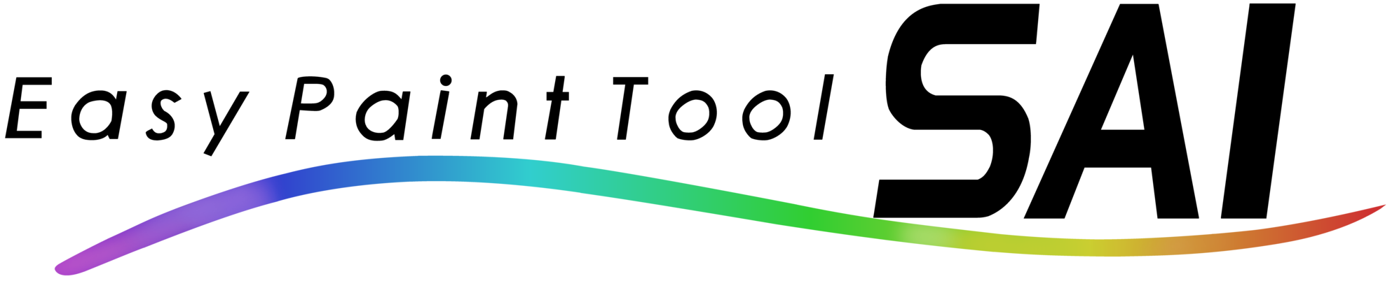 Logo programu Paint tool SAI